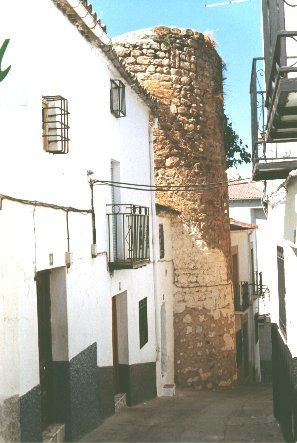 Sólo queda en pie un torreón de los tres que formaban el antiguo castillo-fortaleza de Rus del siglo XIII. Es de mampostería, tiene doce metros de perímetro y sus huecos están constituidos por saeteras y desagües. Hasta hace pocos años se mantenía en pie otro situado en la calle Turrumbero que, al estar menos elevado, probablemente tuviese la puerta de entrada.